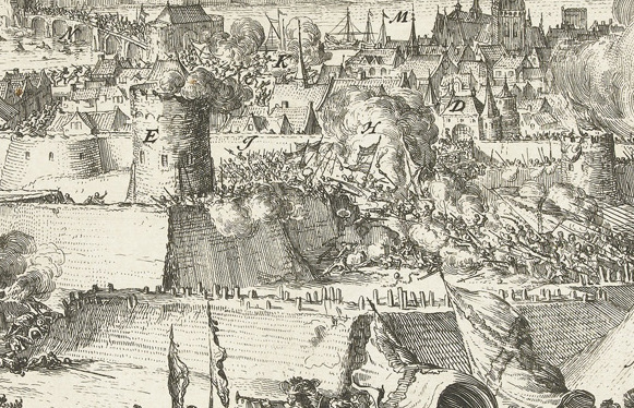 Inname van Maastricht door de hertog van Parma, 1579, Romeyn de Hooghe, 1670 - 1699